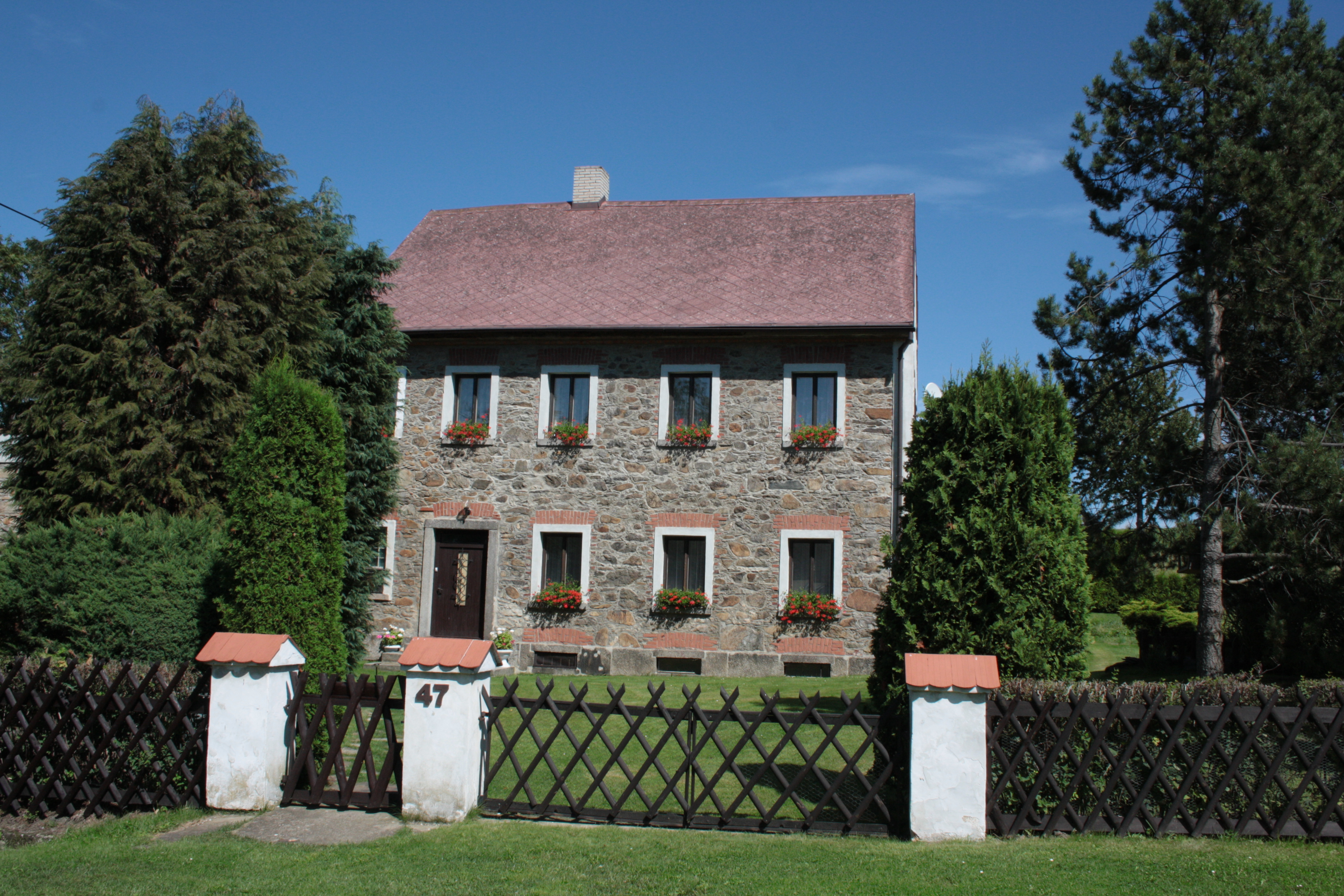 This photograph was taken with a DSLR from WMCZ's Camera grant. Dům číslo popisné 47 v Ludvíkově pod Smrkem.